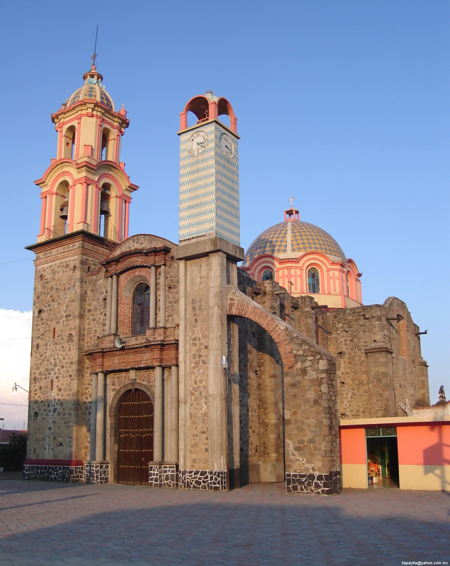 Vista principal del templo católico de San Simón Tlanicontla en el municipio de Domingo Arenas, Puebla, México.